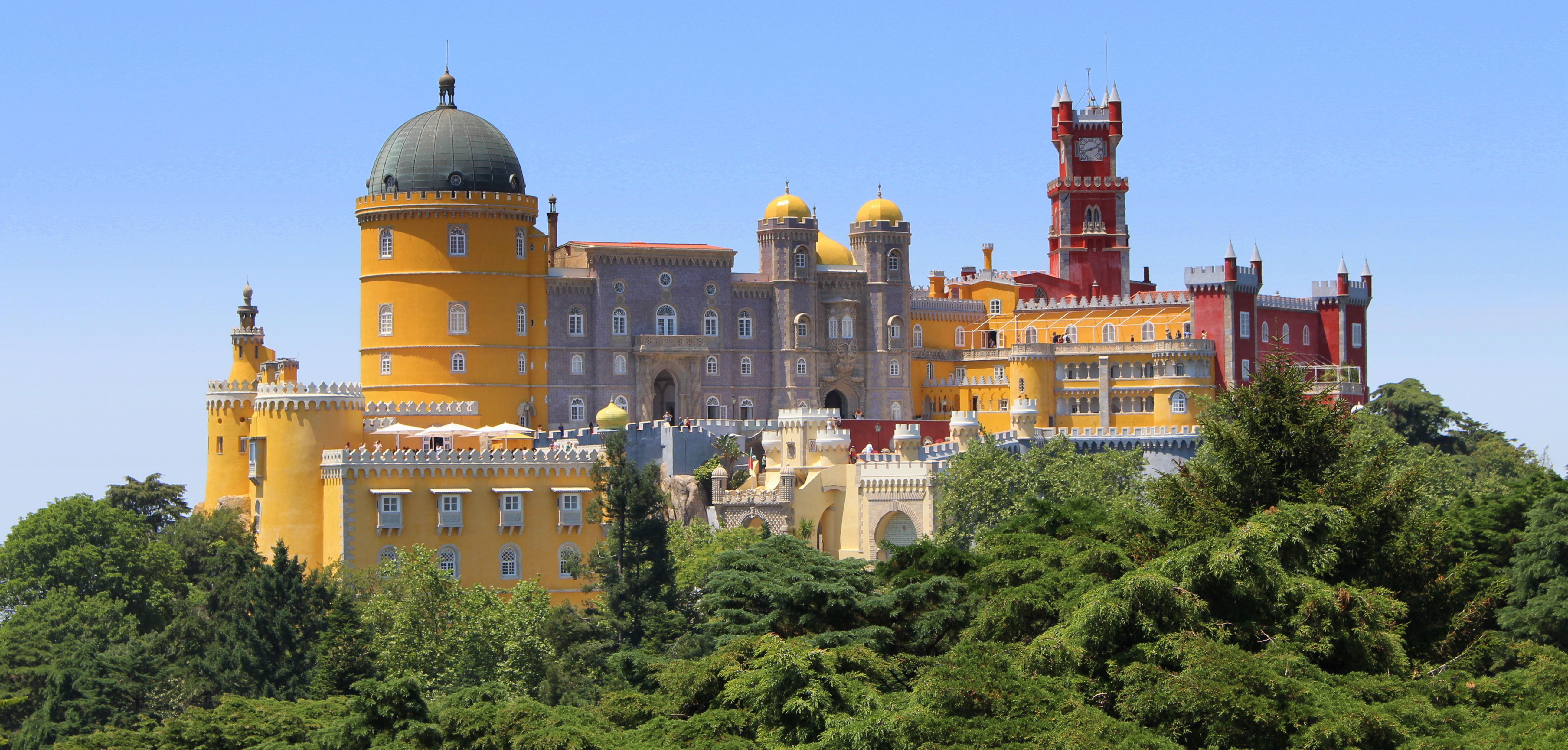 Sintra - Palacio da Pena